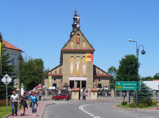 Sułkowice